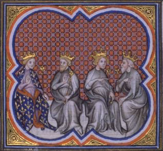 Partage du royaume franc entre les quatre fils de Clovis. Grandes Chroniques de France de Charles V. Paris, XIVème siècle. Bibliothèque nationale de France.